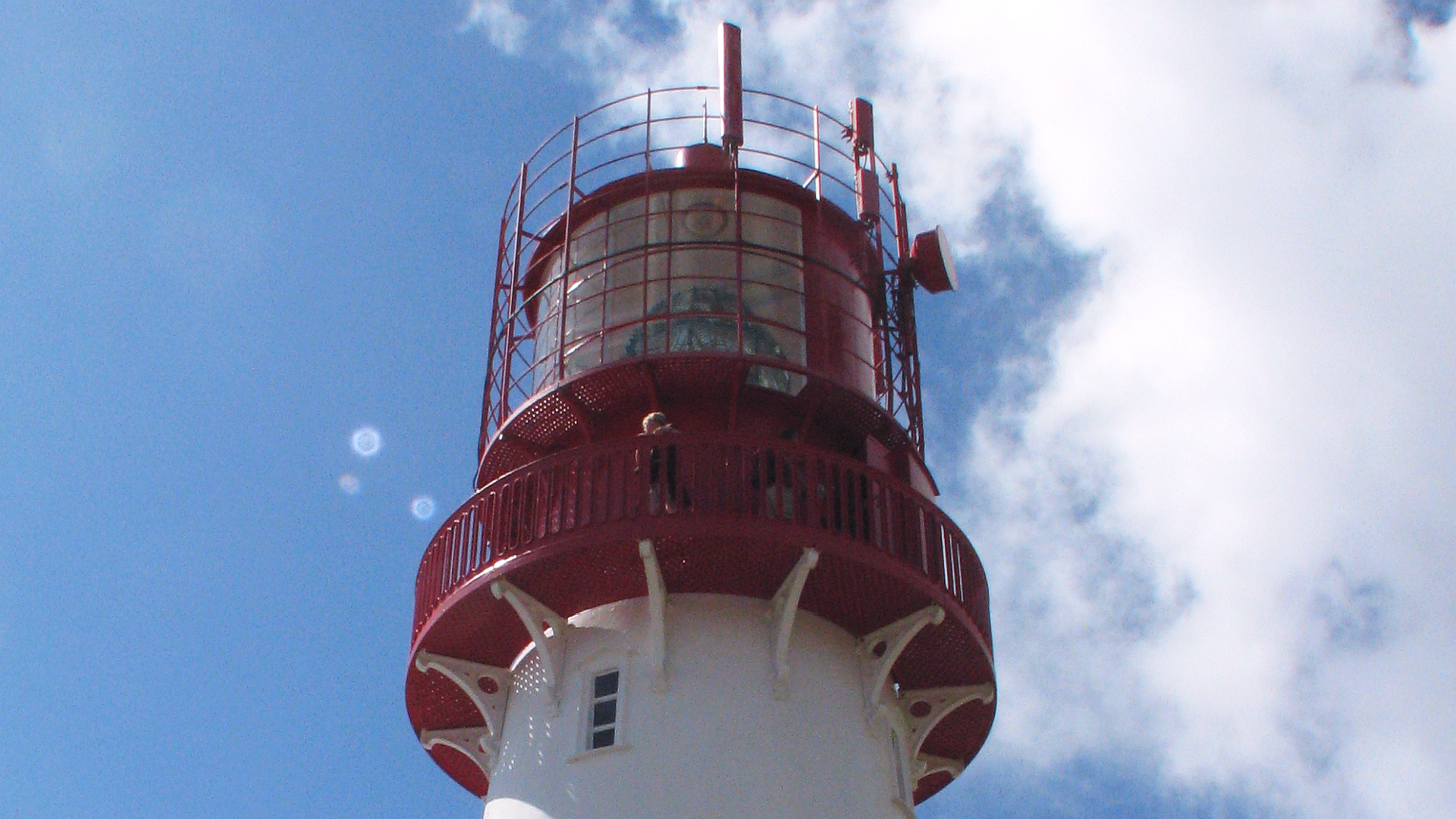 Lindesnes Fyr mit der Laterne des Leuchtturms mit Lichthöhe 50 m über NHN, damit hat das Leuchtfeuer eine Reichweite von 33 km. Region Vest-Agder, Norwegen - Foto Wolfgang Pehlemann IMG_1178